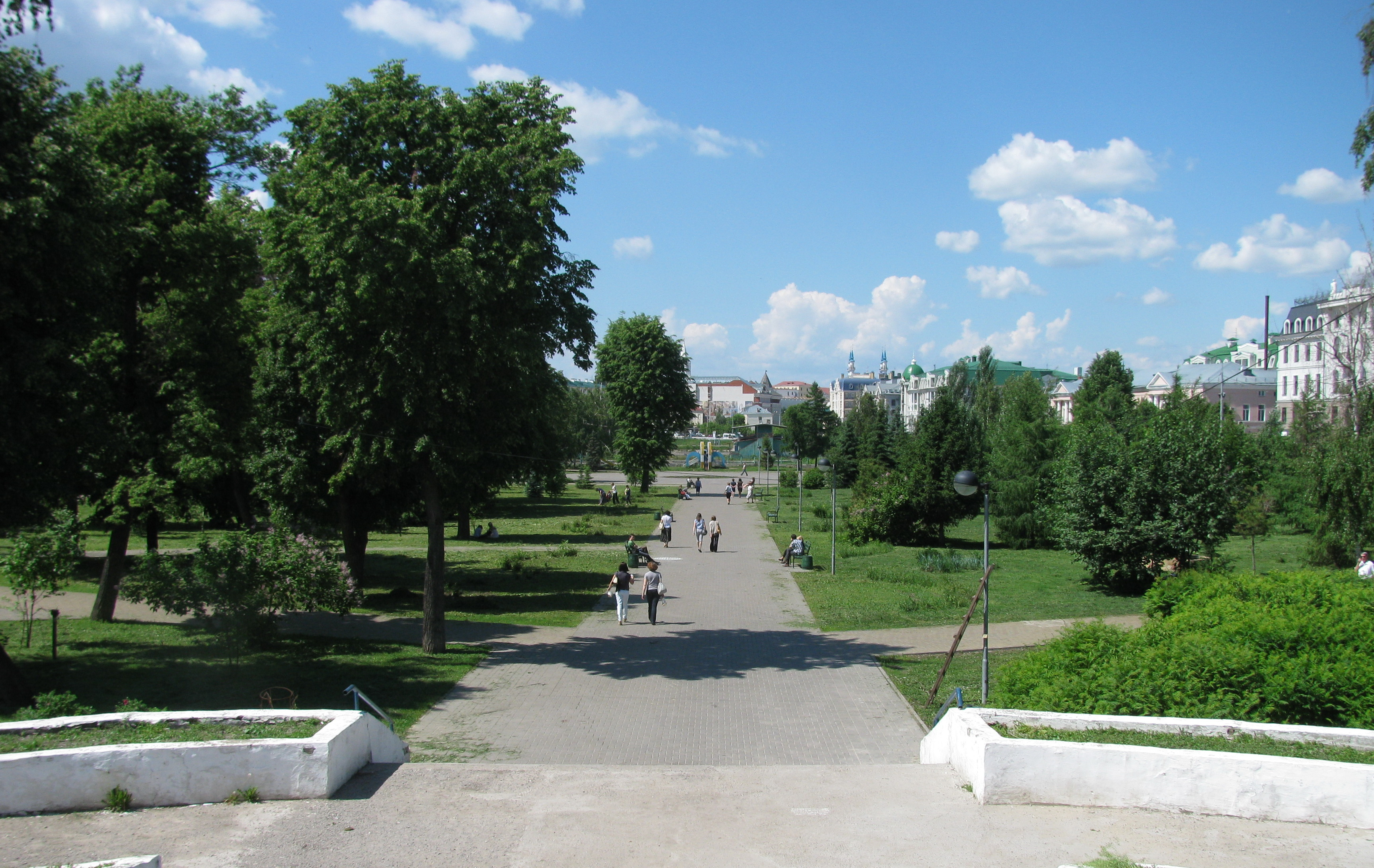 Парк Чёрное озеро — центральная аллея